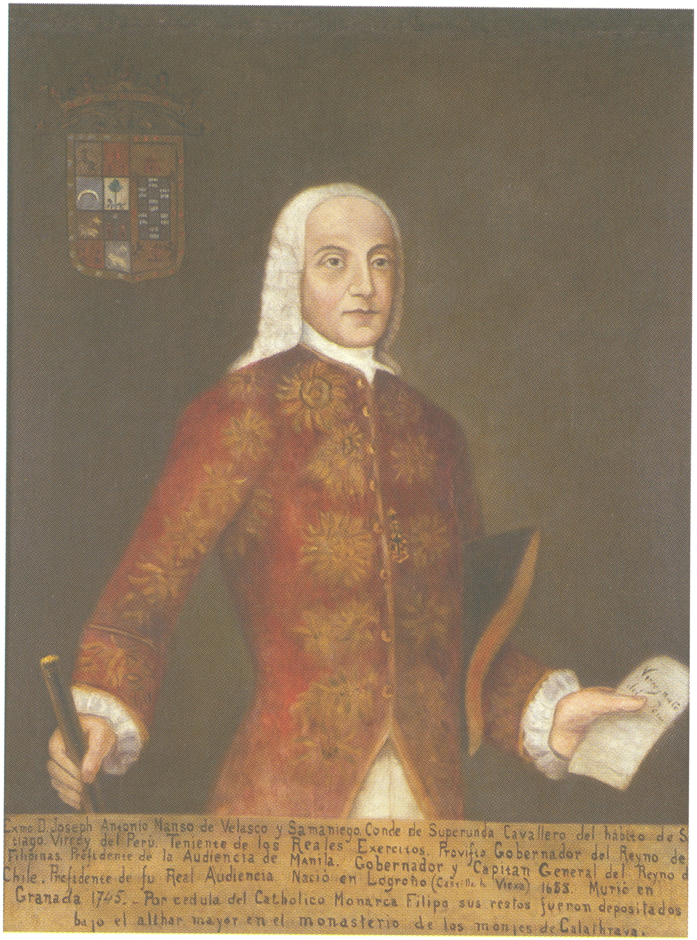 Colección del Museo Histórico Nacional de Chile (2009). La Pintura como Memoria Histórica. Dirección de Bibliotecas, Archivos y Museos de Chile, Santiago de Chile Año 2009. Imagen consultada en el Fondo de Bibliografía Digital del Archivo Histórico del Guayas (AHG) Guayaquil, Ecuador. Compartido y consultado usuario J. Javier García A.